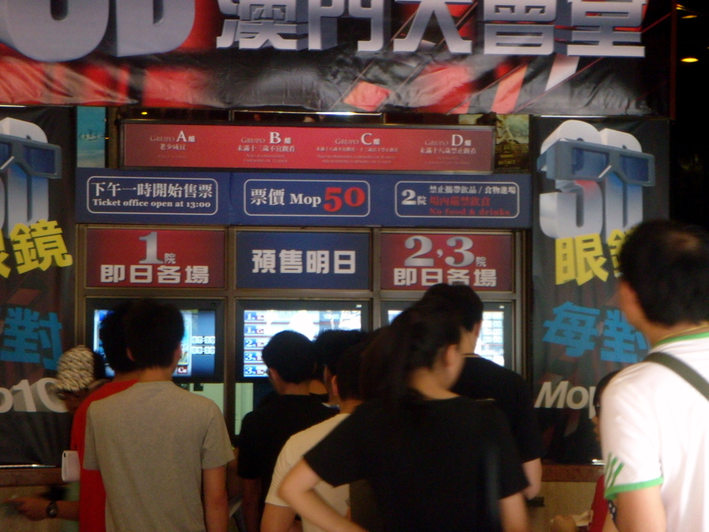 澳门大会堂售票厅